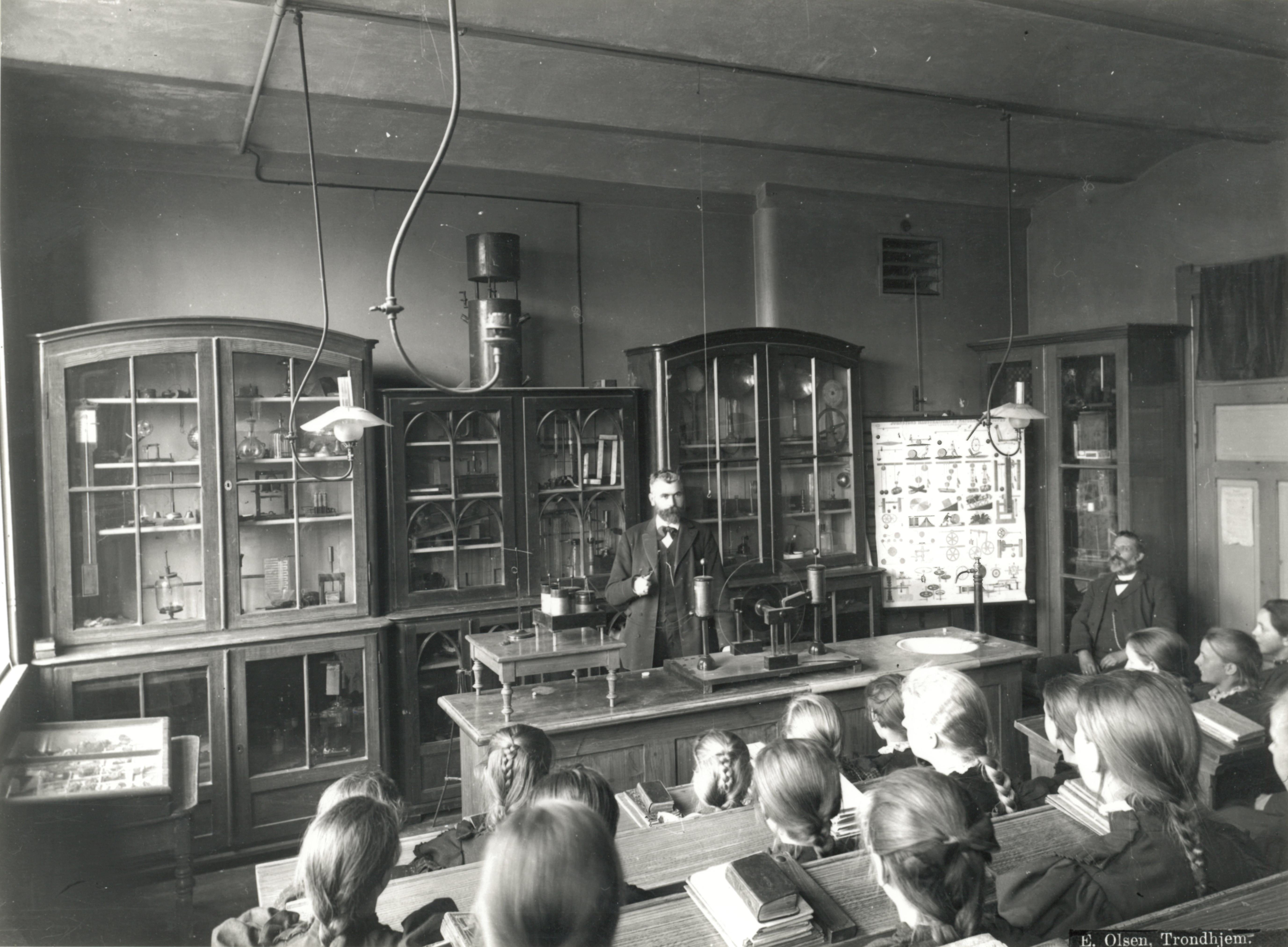 Fotograf: Erik Olsen (1835 - 1920). Format: Fotopositiv. År: Ukjent (ca. 1900). Fotokopi fra en tidligere utstilling. Om fotografen: OLSEN, ERIK - Trondhjem 1869 - ca. 1916/17 f. i Meraker 2.5.1835 - d. i Trondhjem 16.10.1920. Arbeidet først på bergskriverkontoret i hjembygden, var så proviantskriver på Røros i 1863. Hadde deretter forskjellige kontoristjobber til han 1.6.1869 overtok Charles Foss's atelier på Bratøren i Trondhjem (Meisterlins Gaard) etter å ha gått i lære hos ham. I 1882 (muligens allerede i 1879) kjøpte han Søndre Gade 6 og flyttet atelieret dit i 1883. Fra 1902 var han i Olaf Trygvesøns Gade 21, og fra 1910 i Schultzgd. 7. Han var Domkirkens faste fotograf fra 1870 til ca. 1916/17. Endel av platene hans ble i 1895 av F. Scarlett laget til lysbilder til bruk for turistreklame, noen av dem ble farvelagt av den engelske kunstmaler Acres i London. Blant disse var noen fra Værdalsulykken. De gikk dessverre tapt på Norwegische Reisebureau i Berlin i 1944. Noen av hans plater ble (antakelig sammen med platene etter Charles Foss) overlatt til Trondhjems Historiske Forening. Platene og protokollene eies nu av Videnskabsselskabet, Museet. På Bergensutstillingen i 1898 stilte han ut "Fotografier, fra Visitkortformat til Legemsstørrelse". Han var formann i Nordenfjeldske Fotografers Forening ca. 1905/06, og ble æresmedlem der i 1913. Ivrig skiløper til langt opp i alderdommen. Hentet fra Bonge, Susanne: Eldre norske fotografer. Fotografer og amatørfotografer i Norge frem til 1920 (Universitetsbiblioteket i Bergen, 1980)